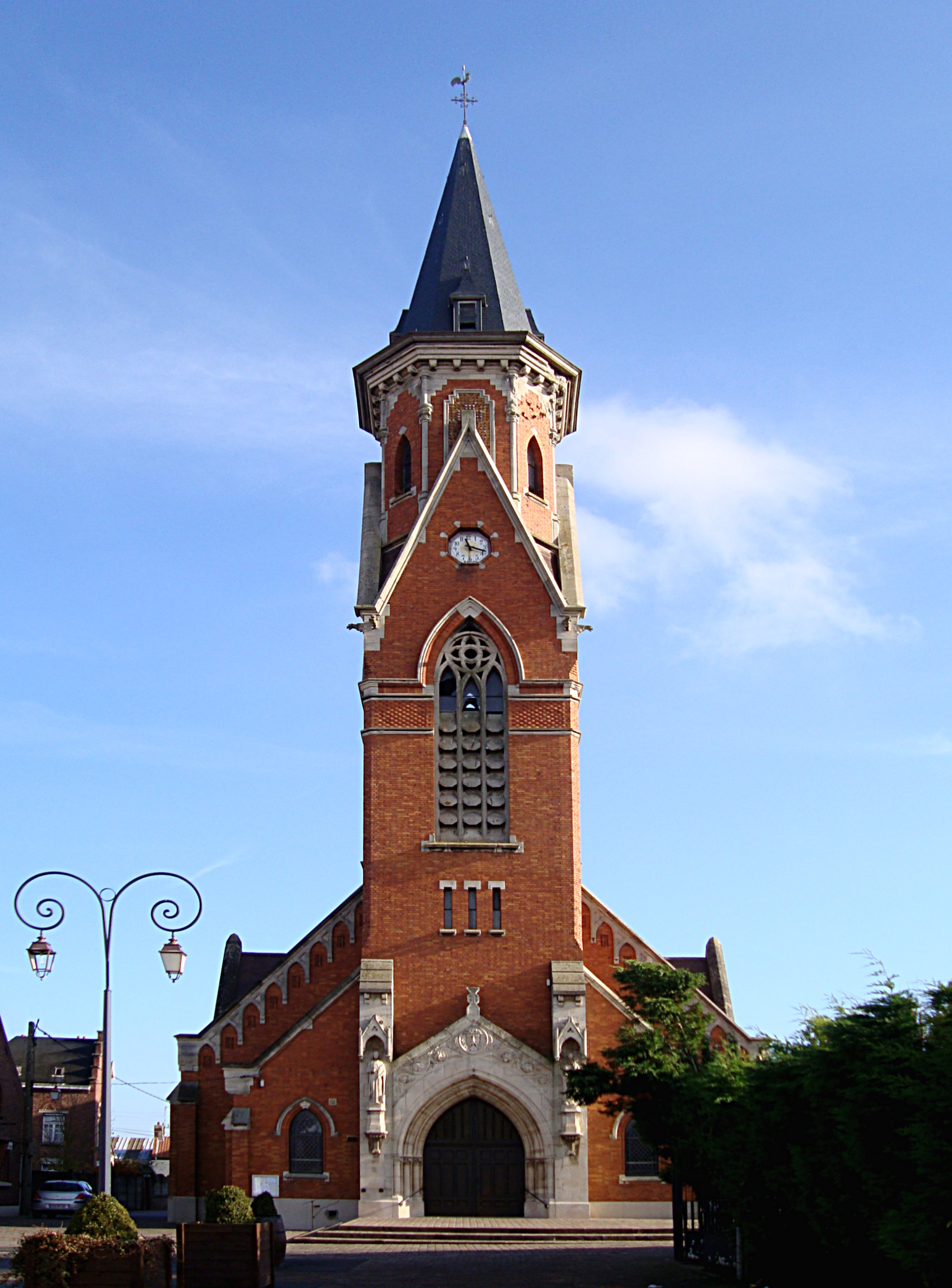 L'église Saint-Vaast d'Illies (Nord). Détruite au cours de la première guerre mondiale, elle a été reconstruite après 1918.